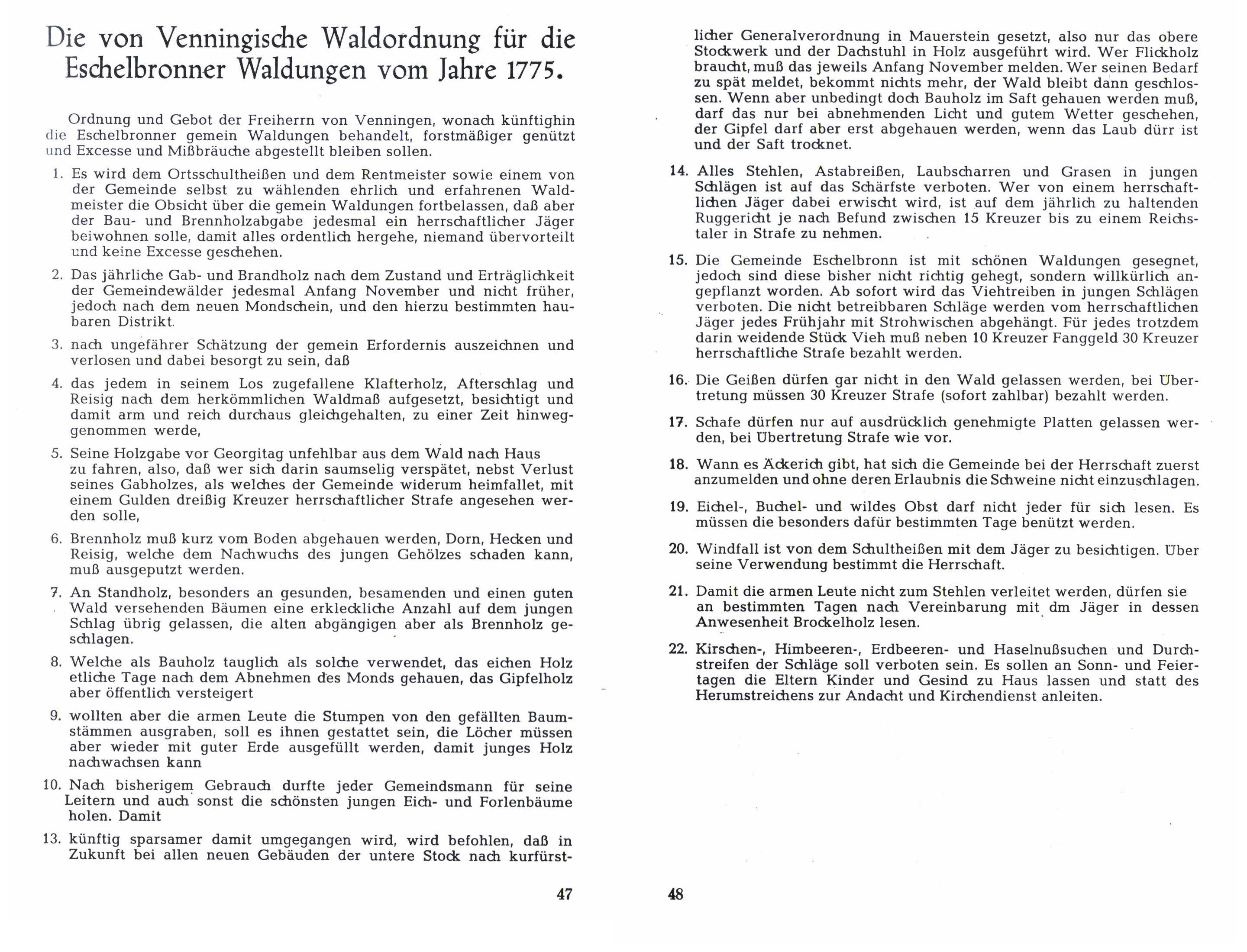 "Ordnung und Gebot der Freiherren von Venningen, wonach künftighin die Eschelbronner gemein Waldungen behandelt, forstmäßiger genützt und Excesse und Mißbräuche abgestellt bleiben sollen."